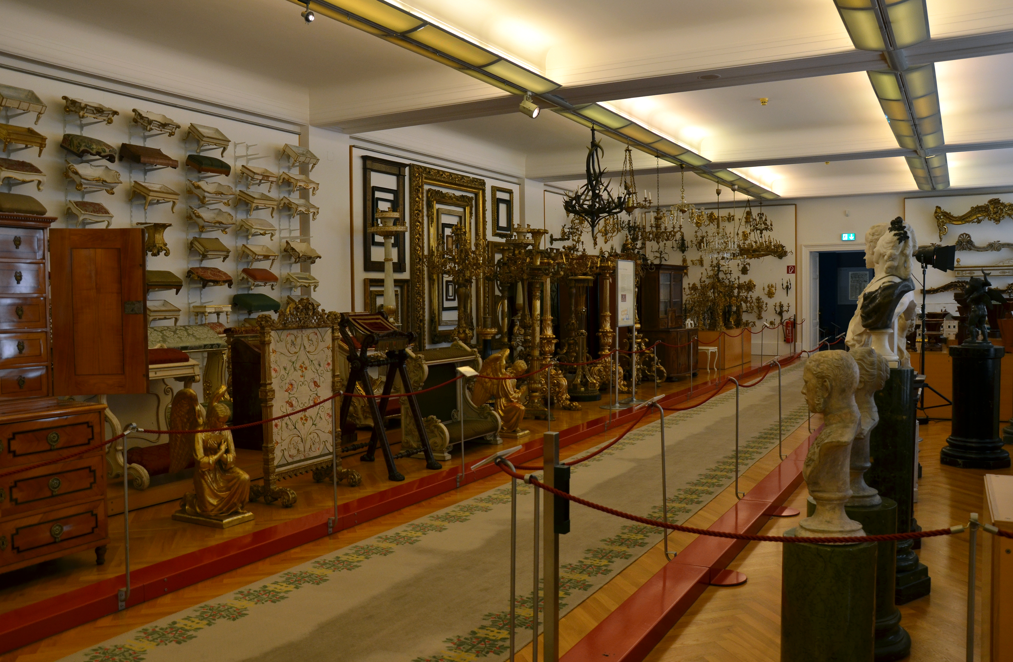 Le Garde-Meuble Impérial ( Kaiserliches Hofmobiliendepot ) à Vienne.